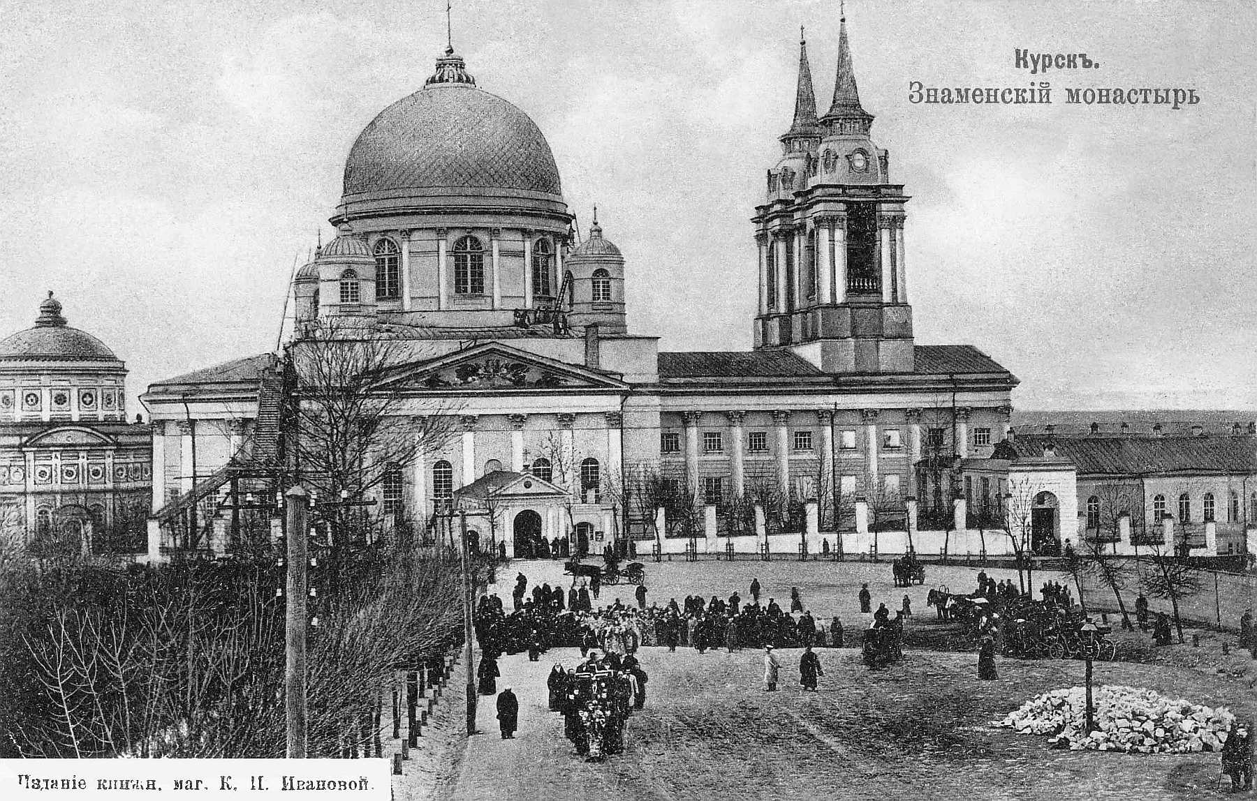 Крестный ход на Красную плщадь 18 апреля 1898 года по случаю открытия трамвайного движения в Курске. Справа груда булыжников, составлявших часть мостовой, разобранной при прокладке трамвайного пути. У апсиды Знаменского собора возведены леса для устранения последствий взрыва, произведенного А.Г.Уфимцевым 8 марта 1898 г. Над фронтоном у малой главы видны рабочие. Слева от собора Воскресенская церковь, справа - архиерейский дом